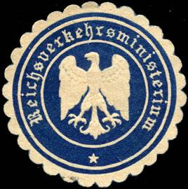 Sealing stamp Title: Reichsverkehrsministerium Description: blau, weiß, geprägt Place: size: 4 cm